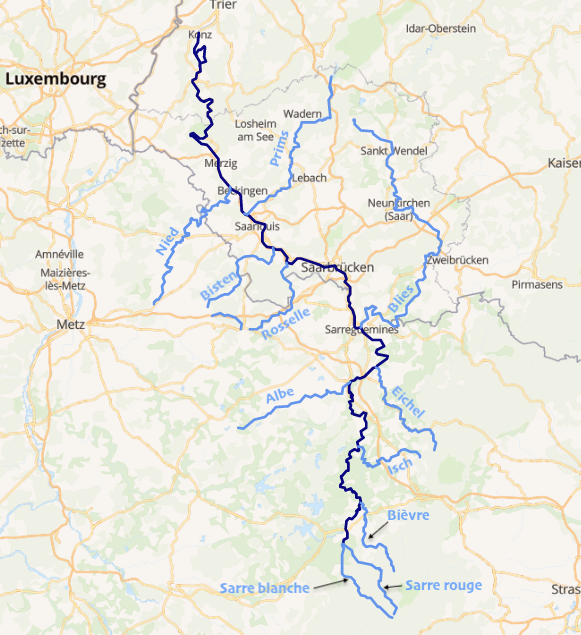 carte réalisée sur umap This map may be incomplete, and may contain errors. Don't rely solely on it for navigation.